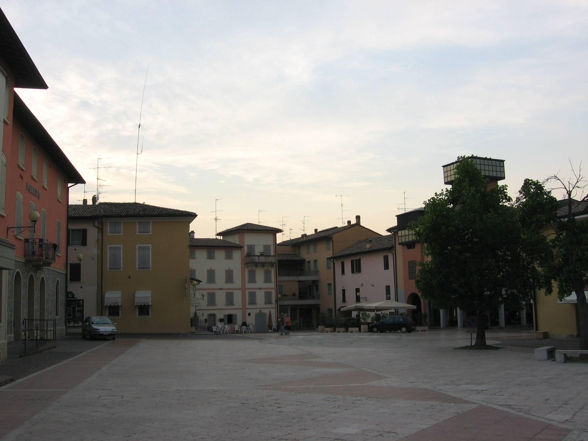 Quattro Castella village entrance